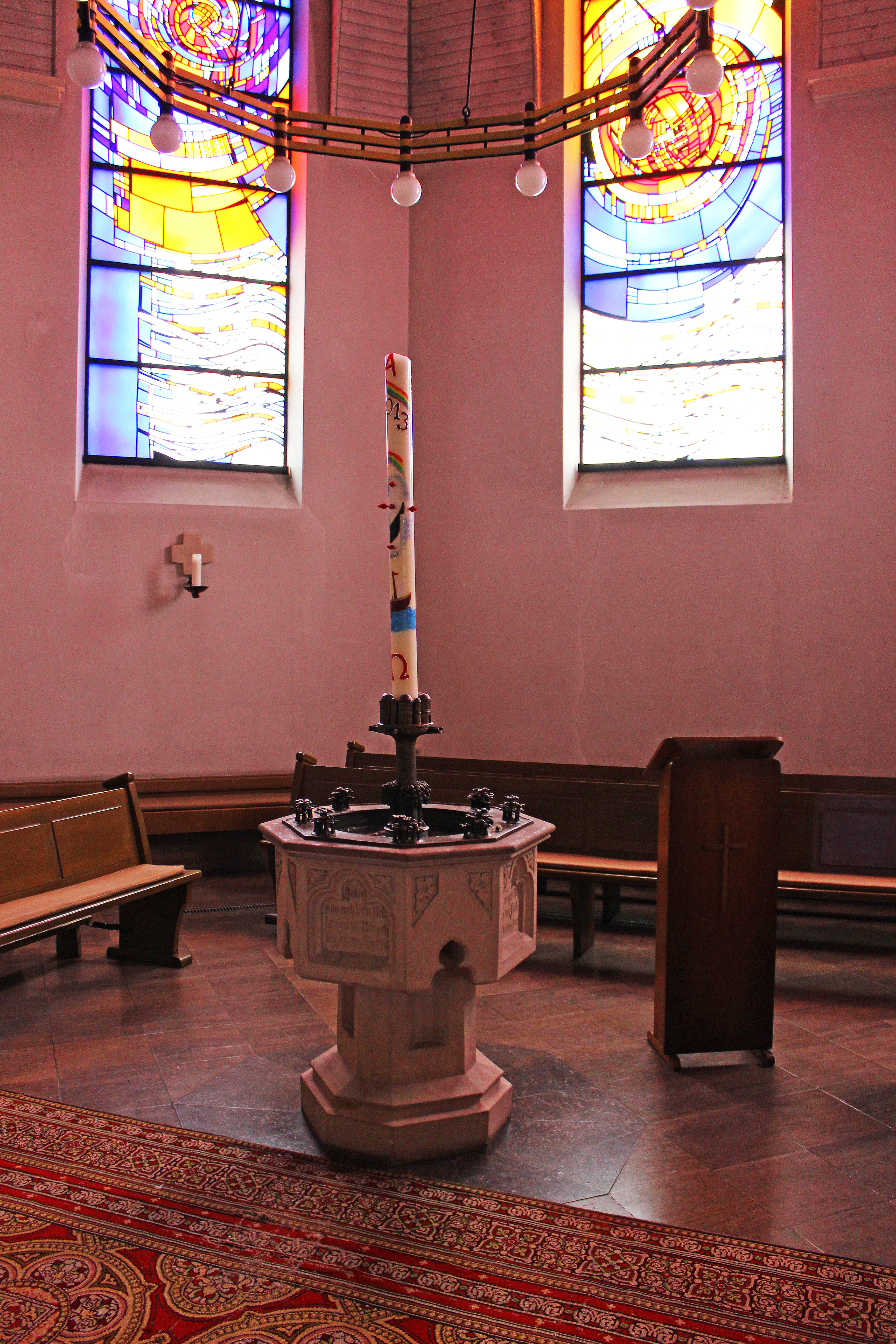 Taufbecken in der katholischen Pfarrkirche Hl. Dreifaltigkeit in Saarlouis-Fraulautern, Saarland